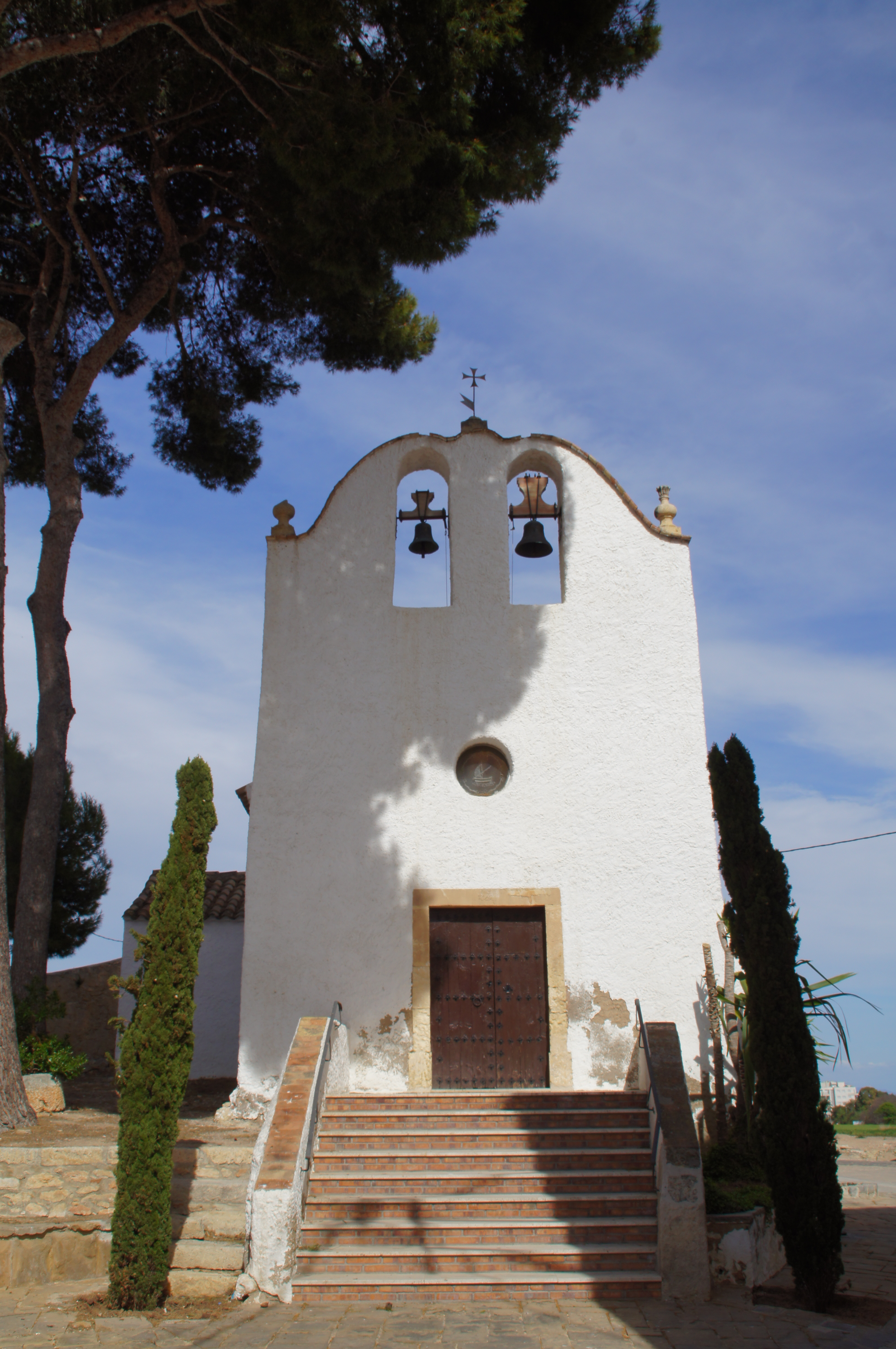 Església parroquial de Sant Joan de Clarà (Torredembarra)